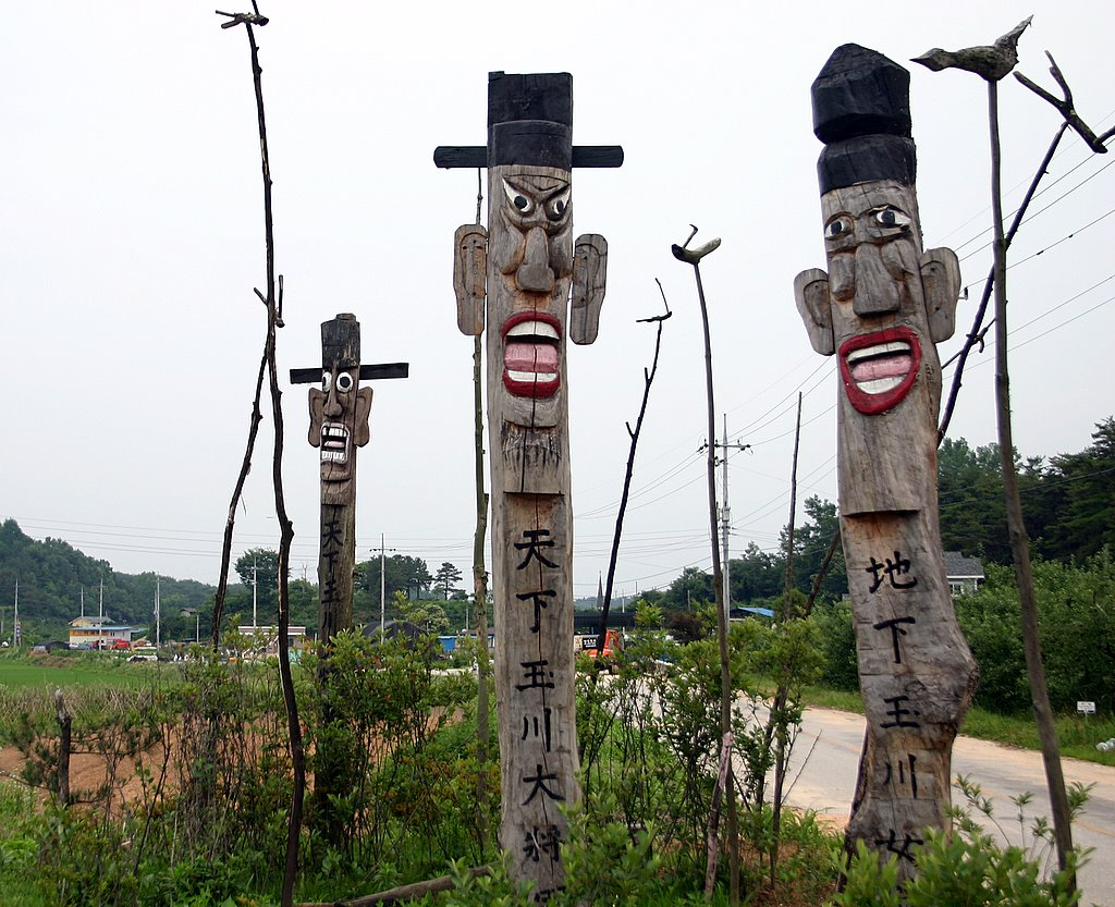 Jangseung and sotdae near Ongcheon-ri, Andong, Gyeongsangbuk-do, South Korea.